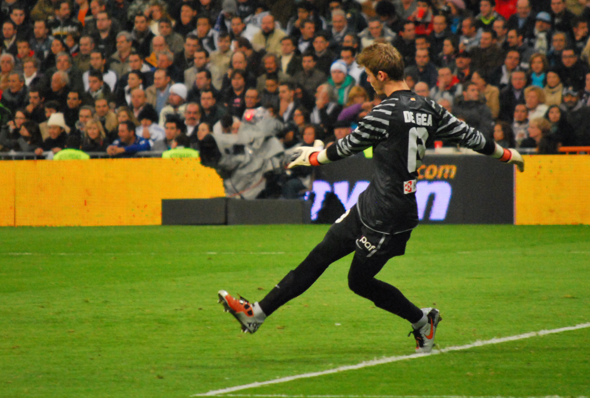 La Liga: Real Madrid 2 - Atletico 0 7 de Noviembre 2010